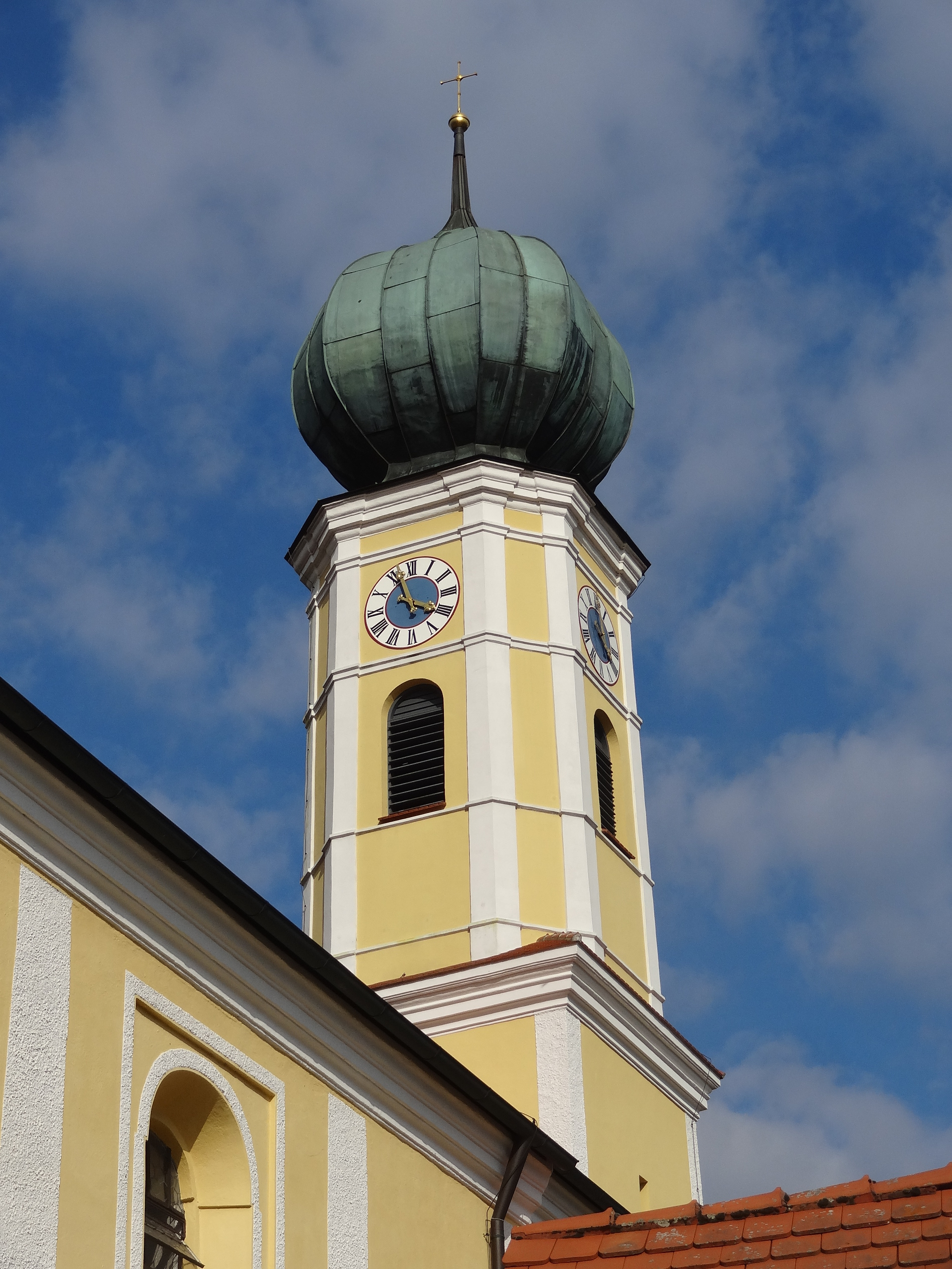 Barocker Turmaufbau mit Zwiebelhaube - Pfarrkirche St. Vitus in Offenstetten (Stadt Abensberg, Landkreis Kelheim)